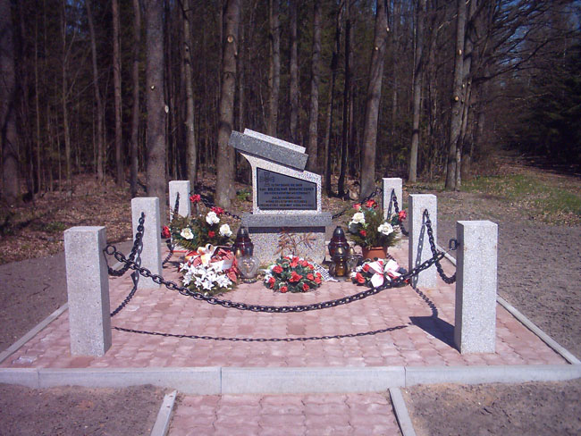 Budy (powiat hajnowski) pomnik kaprala Bolesława Bierwiaczonka. Na terenie wsi znajduje się kopia grobu kaprala Bolesława Bierwiaczonka., który w wyniku odniesionych ran podczas obrony Hajnówki we wrześniu 1939 r. umiera na Budach. Bolesław Bierwiaczonek został pochowany we wsi przez jej mieszkańców. Grób kaprala istniał do 1973 r. gdy szczątki żołnierza ekshumowano i przeniesiono na cmentarz wojskowy w Białymstoku. W obecnym „grobie” złożono urnę z ziemią z pierwszego miejsca pochówku Bierwiaczonka.